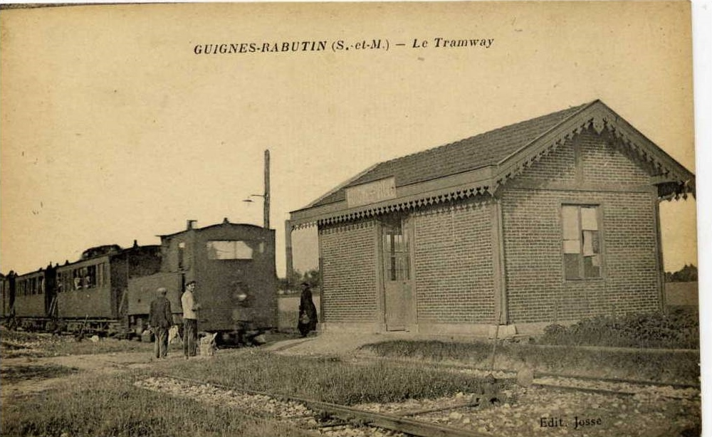 Tramway de verneuil